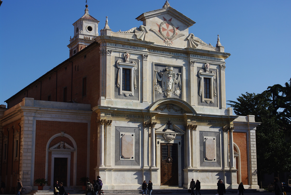 L'église Santo Stefano, piazza dei Cavalieri à Pise (Italie)